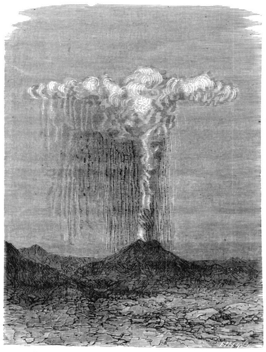 Eruption vaseuse. Illustration de "Histoires des météores", p. 412